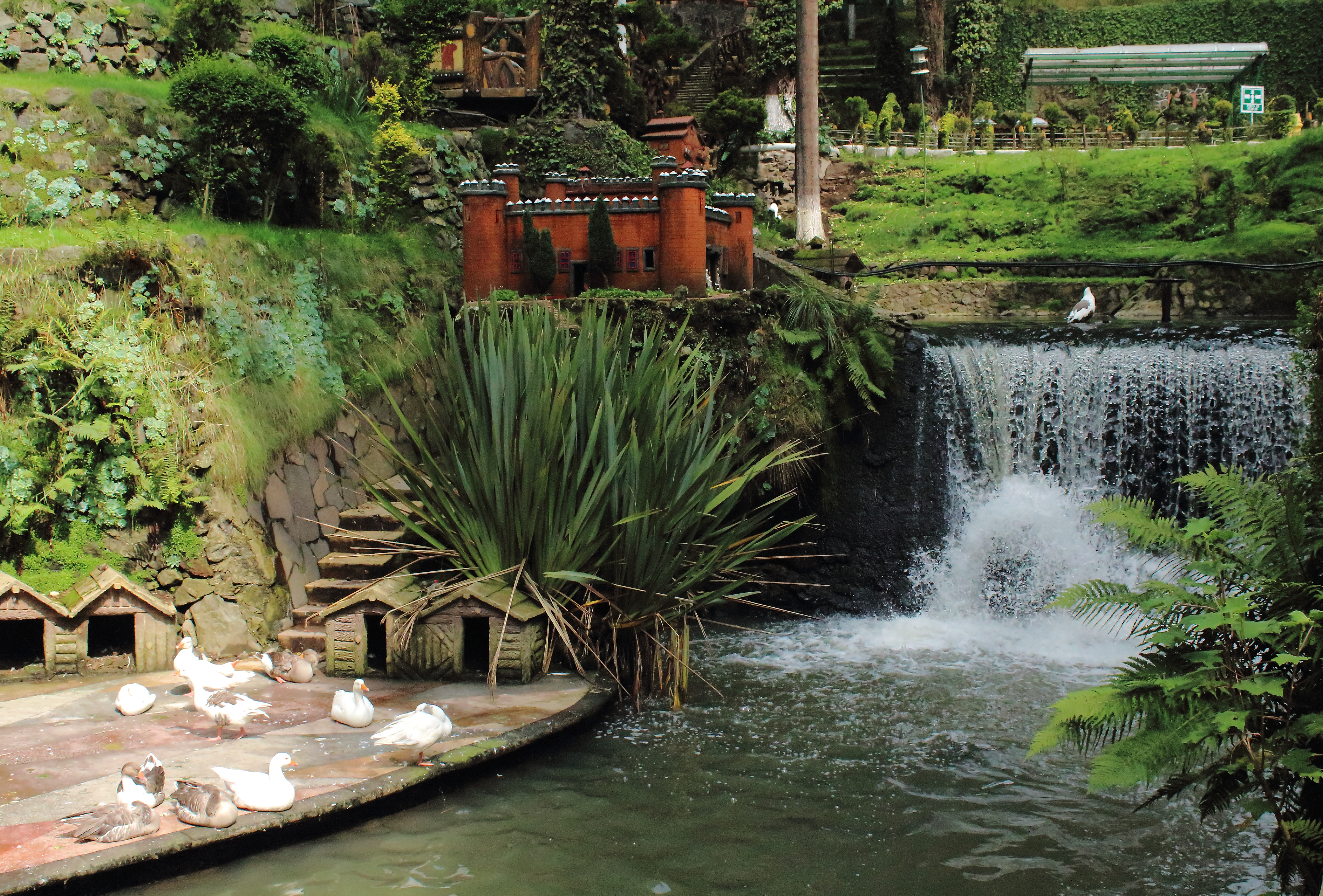 Vista del jardín en restaurante de Toluca, México